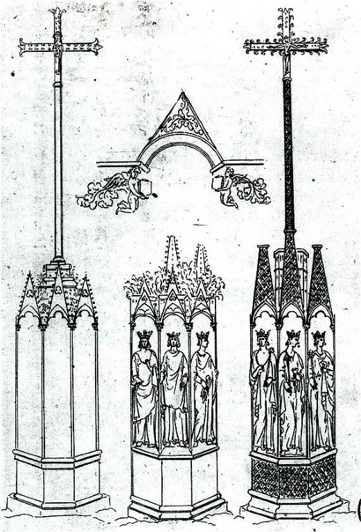 Gravure à l'eau forte du XVIIe siècle représentant les montjoies de Paris à Saint-Denis.